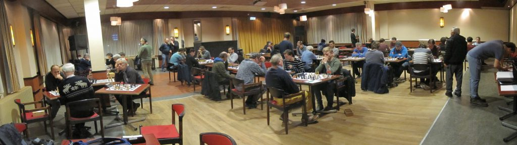 Speelzaal UVS